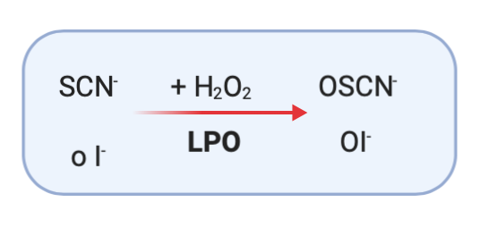 Resum de l'oxidació de SCN- i I- per part de la LPO.